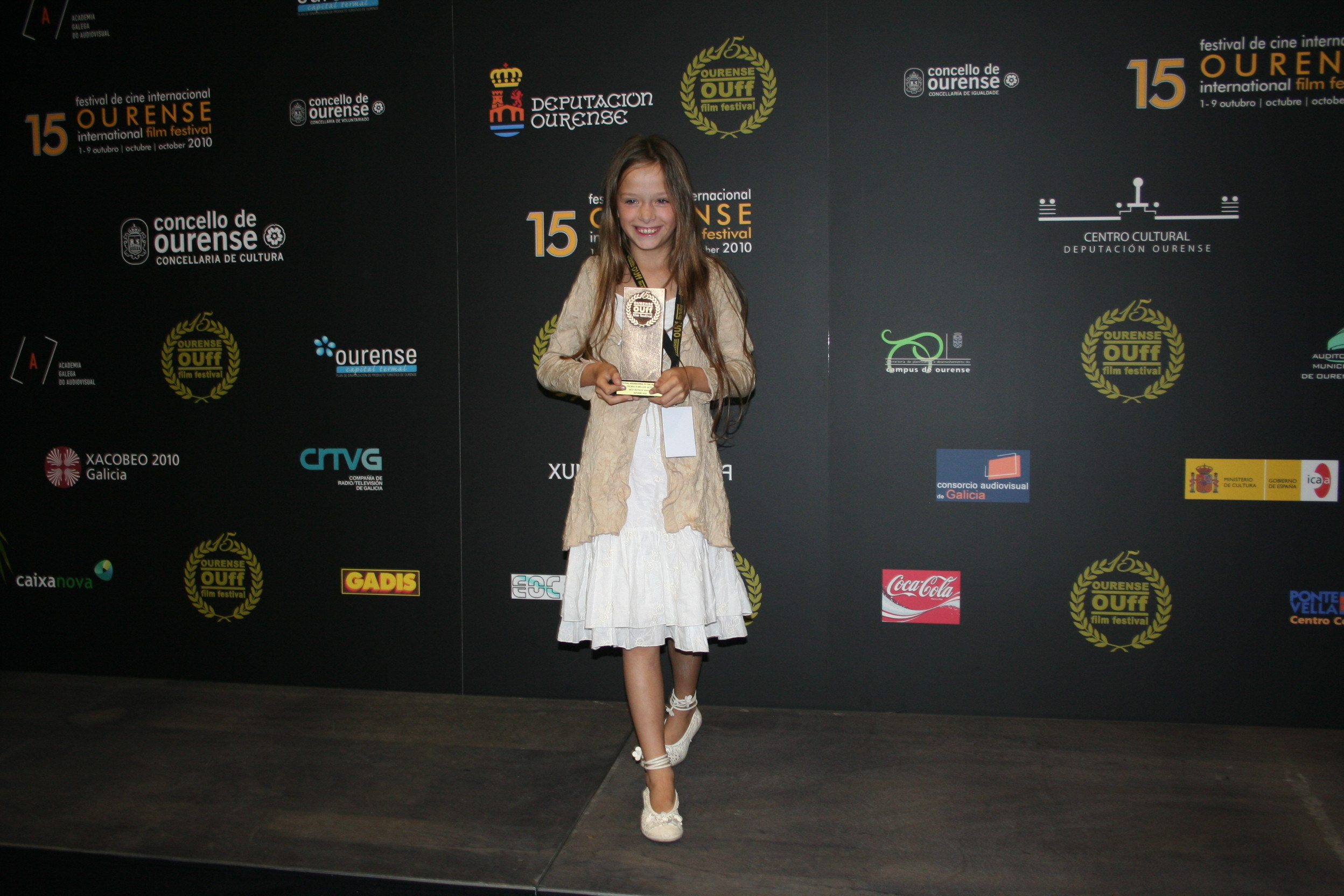 Kimke Desart op het OUFF filmfestival in Ourense (Spanje) waar ze de prijs beste Internationale actrice wint